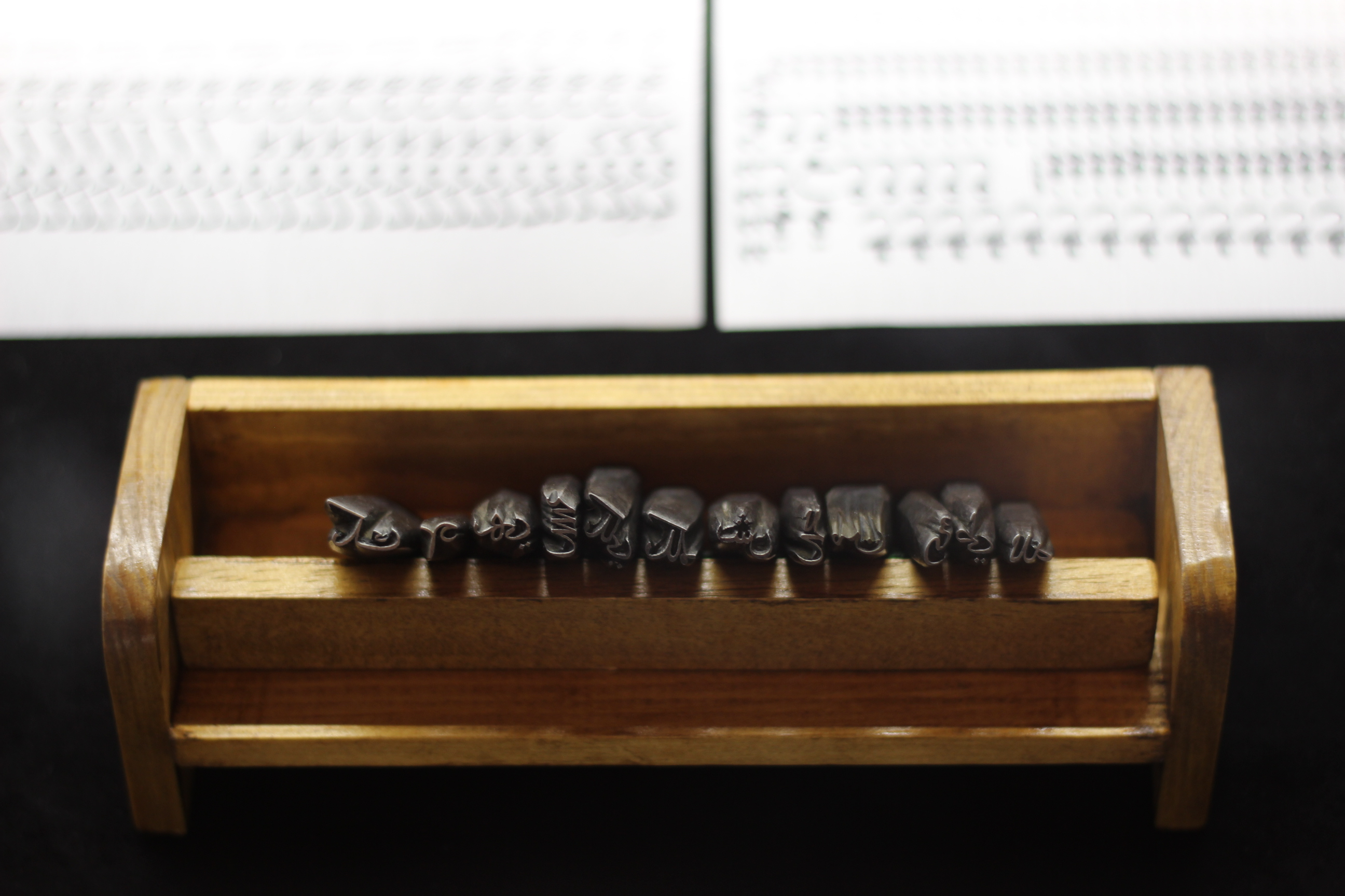 Punches used to strike matrices, the moulds used to cast metal type. Made by Robert Granjon. Original description: Exposition Le Livre à la Renaissance, exposition des trésors de l'Imprimerie Nationale et de ses savoir-faire, pour Le Livre sur la Place de Nancy 2013.